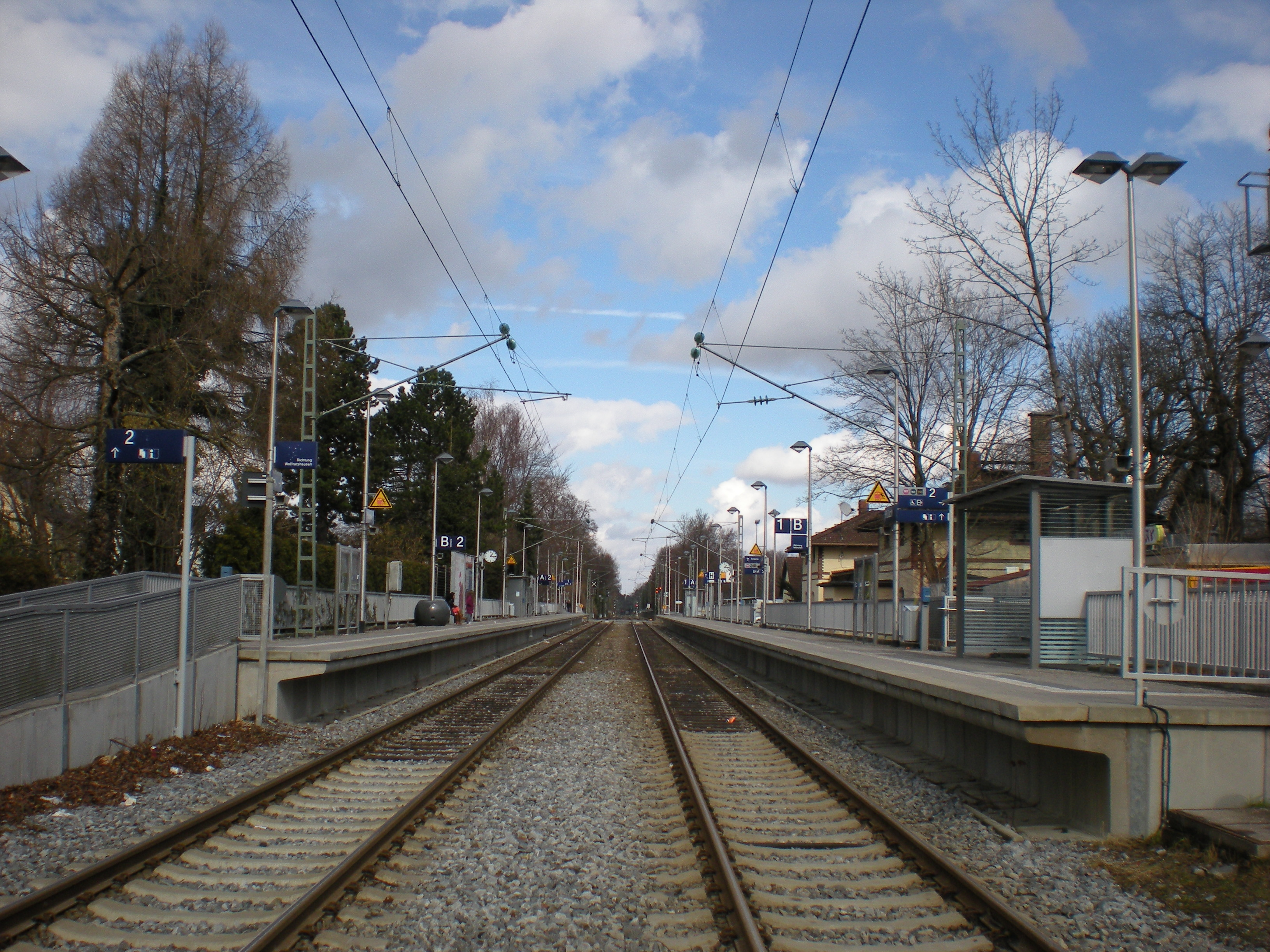 Seitenbahnsteige des Münchner S-Bahnhofs Pullach